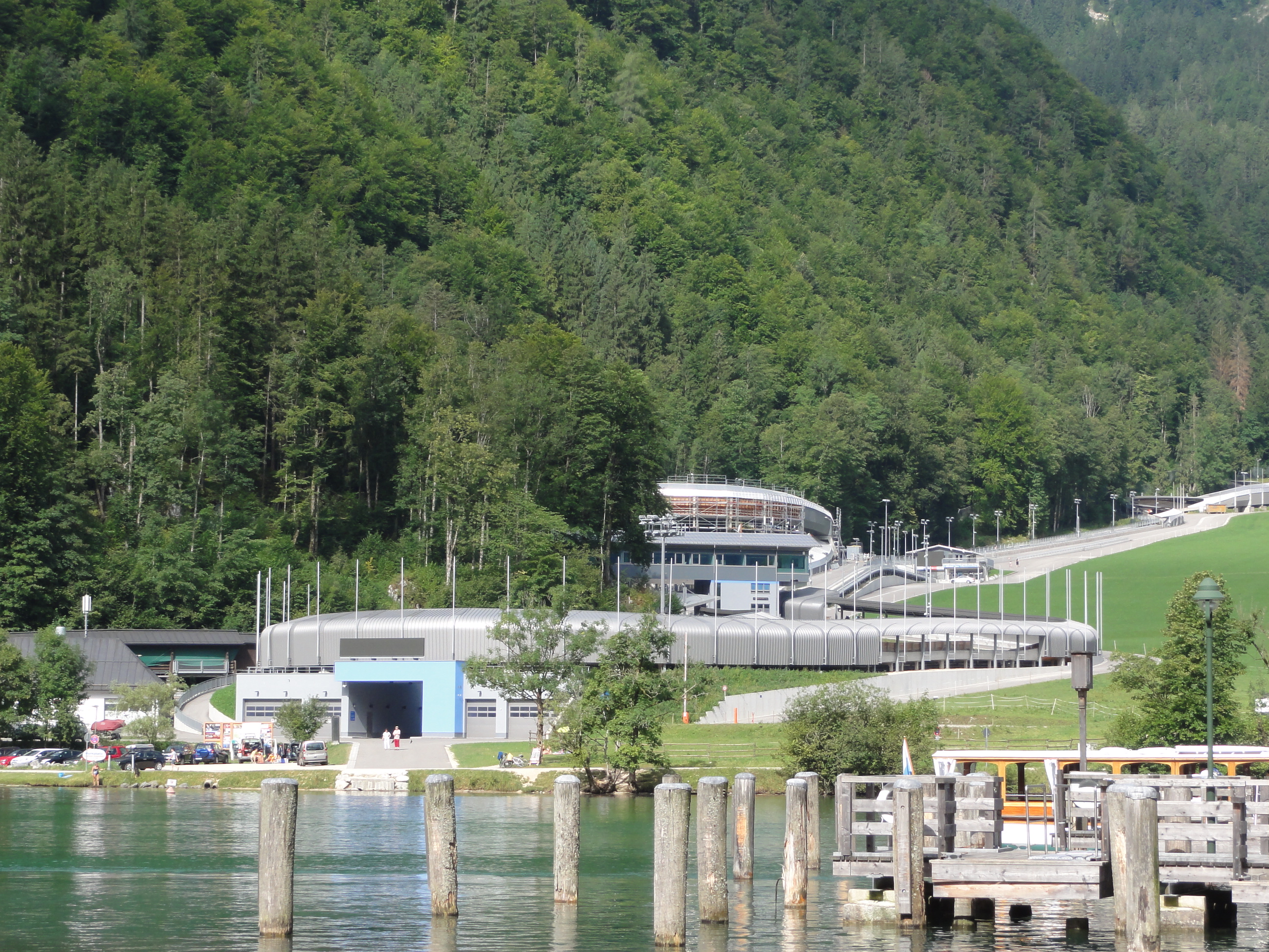 Germany, Bayern, Schönau am Königssee, Ortsteil Königssee